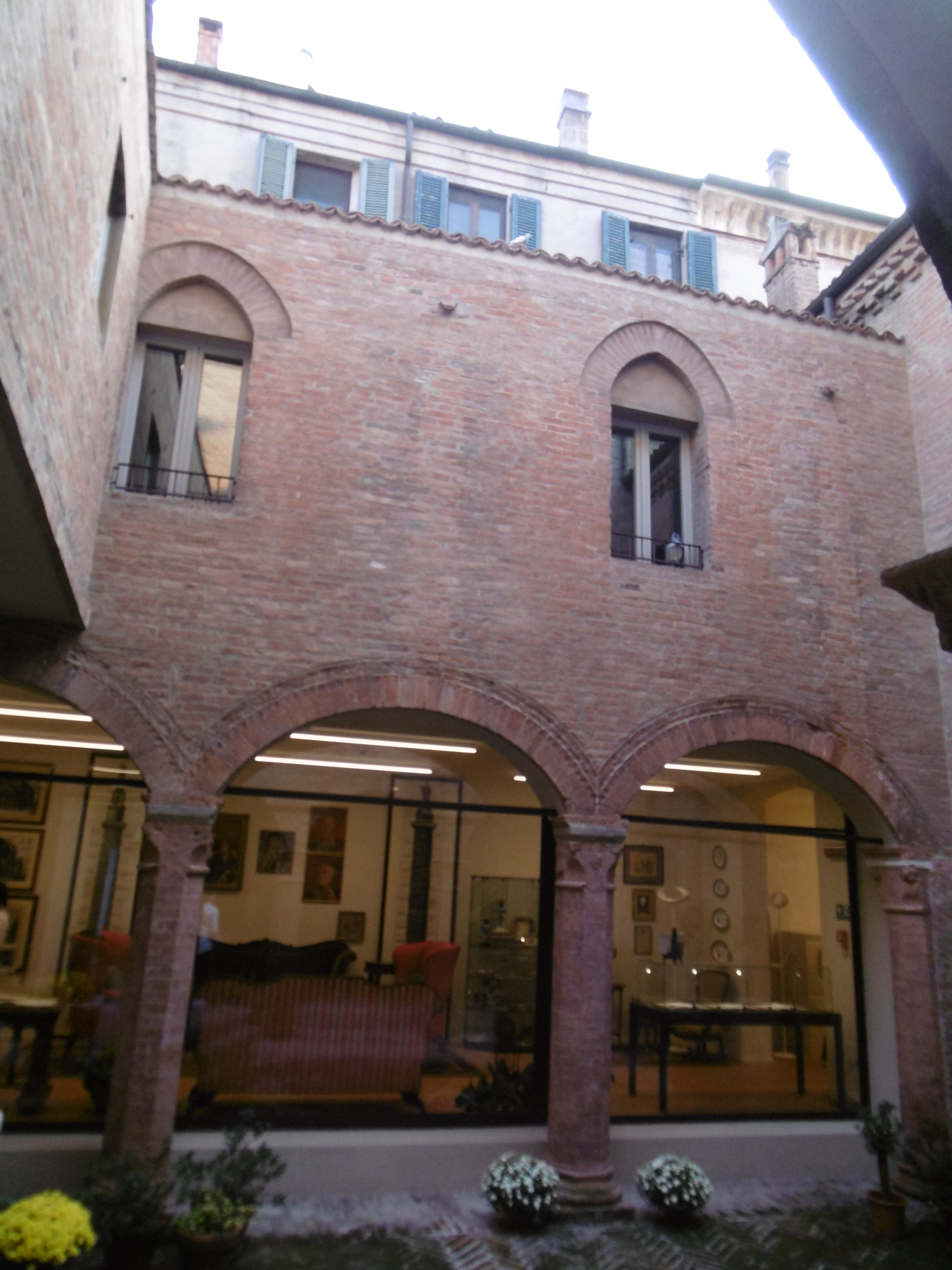 Centro Studi Bassaniani